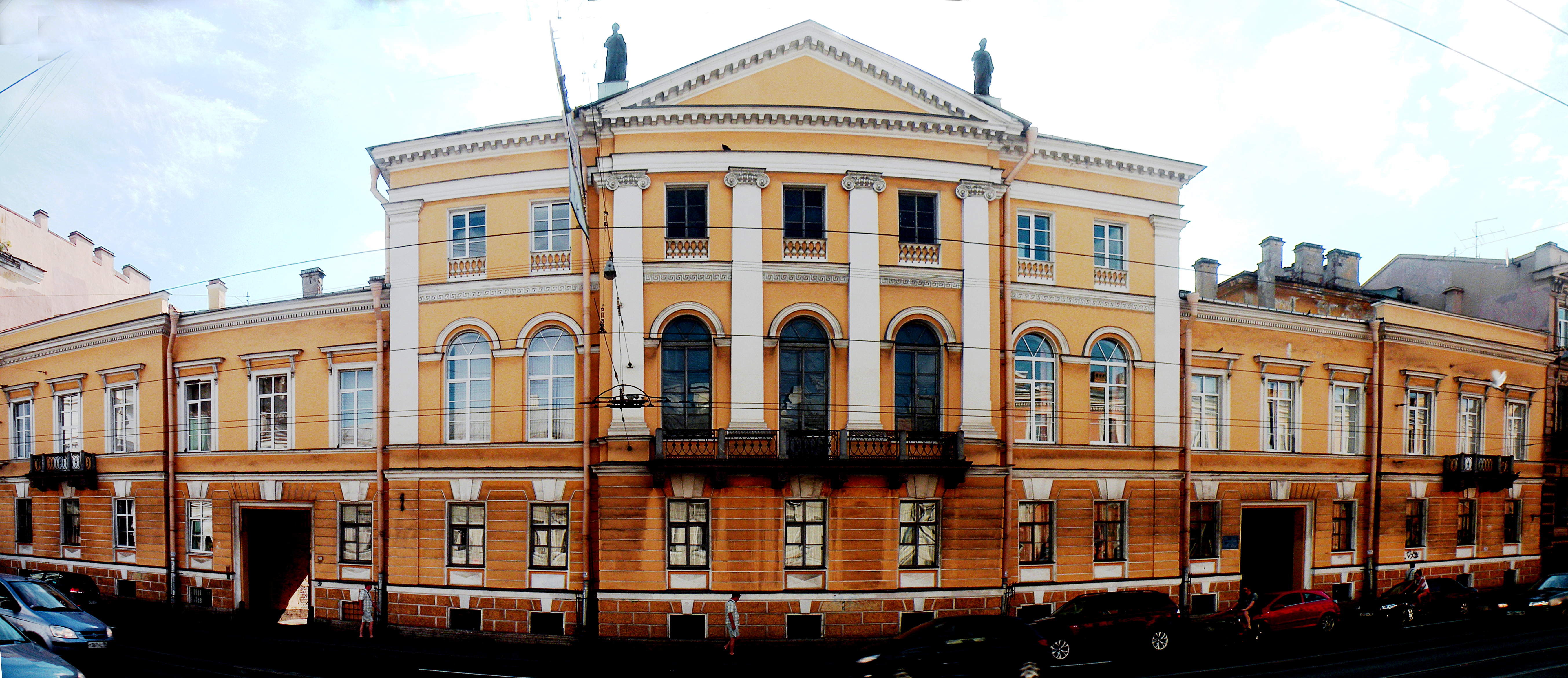 Мейер Христиан Филиппович (1789-1848) Римско-Католическая академия. (1-я линия В.О.52)